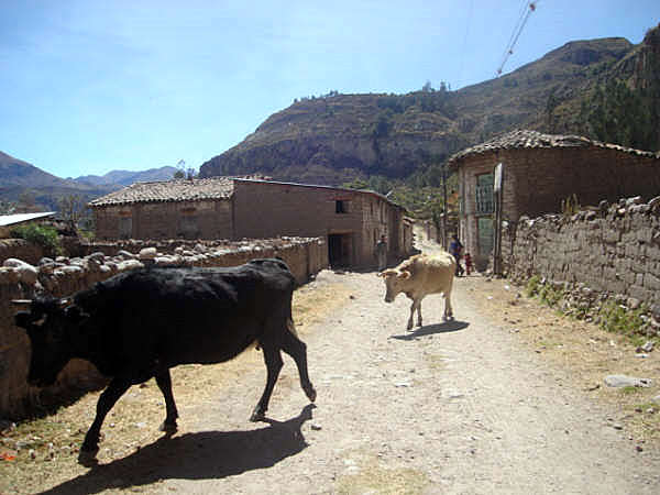 Calle de tierra con vacas en Sondondo (Sondondo, Ayacucho).